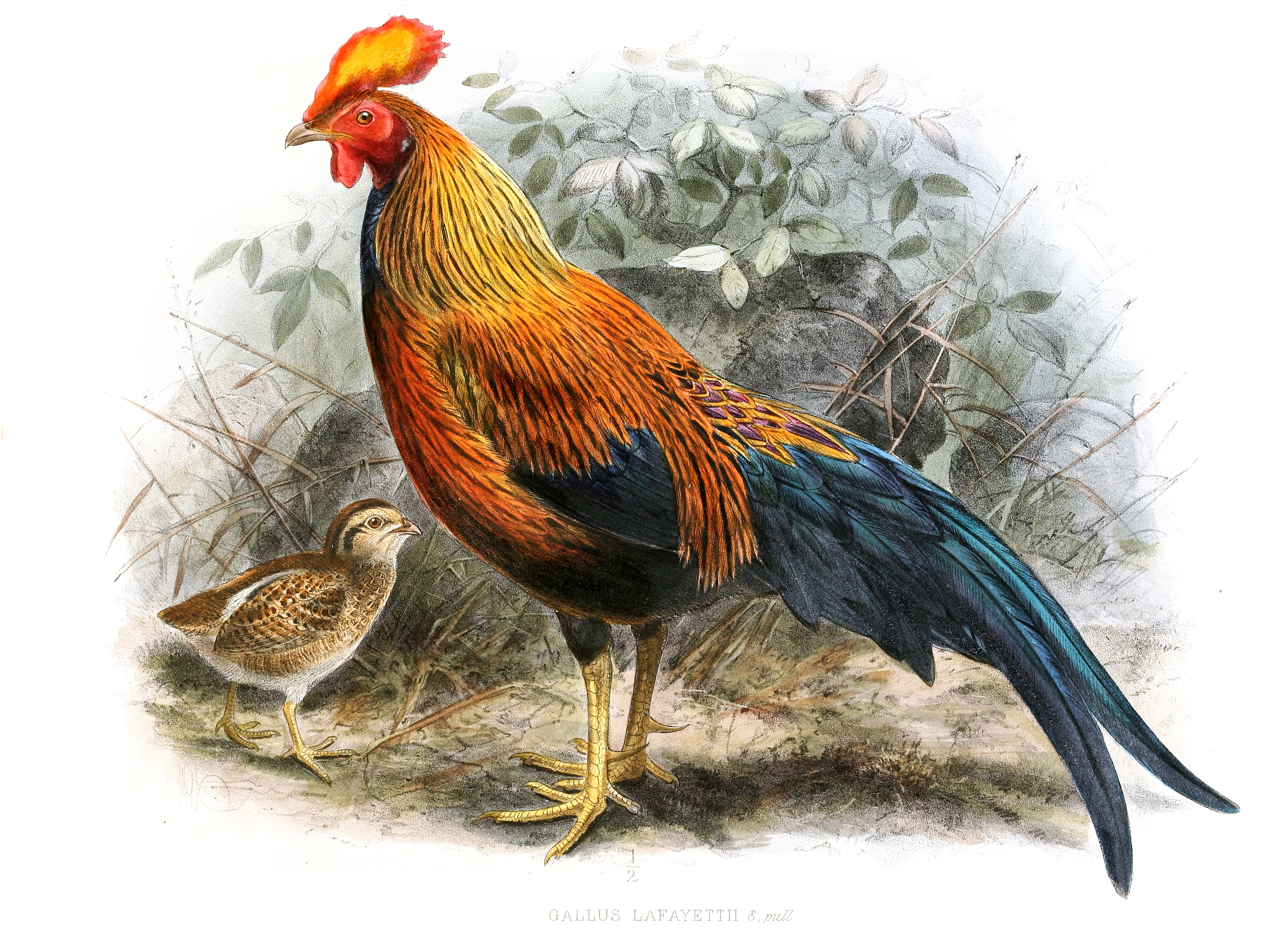 Gallus lafayetii